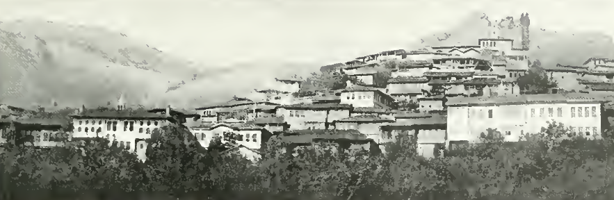 Tokat, Vue générale